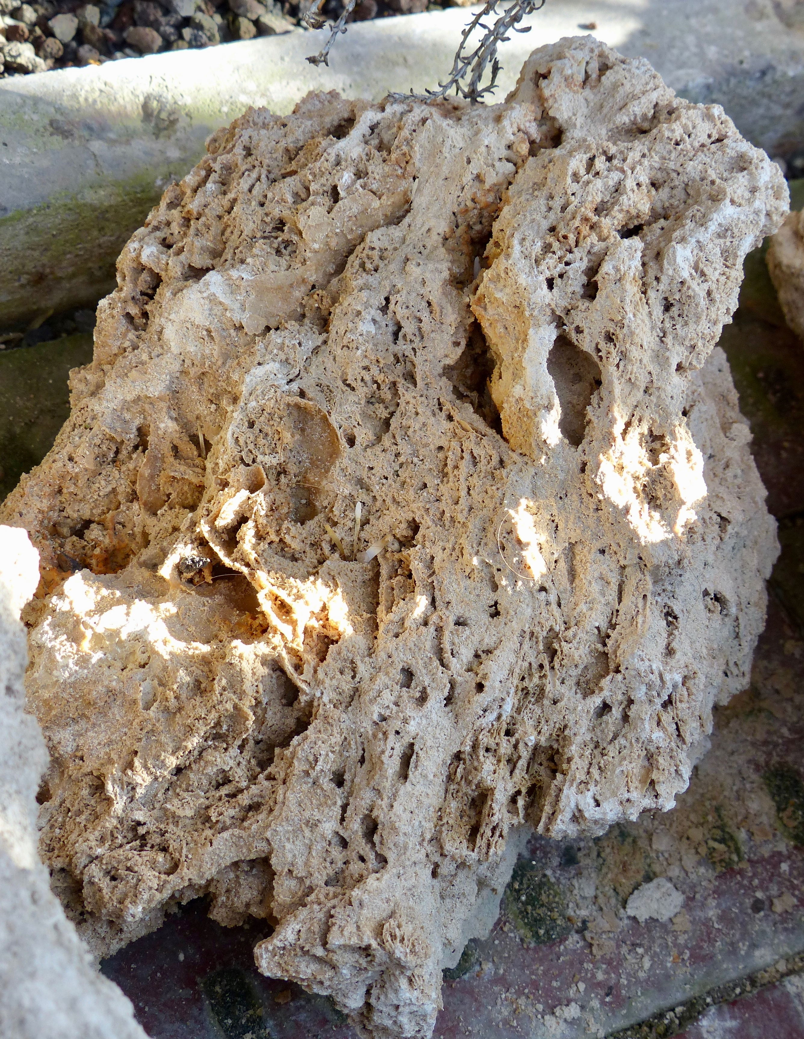 Führung und Fotoexkursion in den Botanischen Garten München-Nymphenburg im Rahmen des WikiAlpenforums: Kalktuff als Pflanzstein